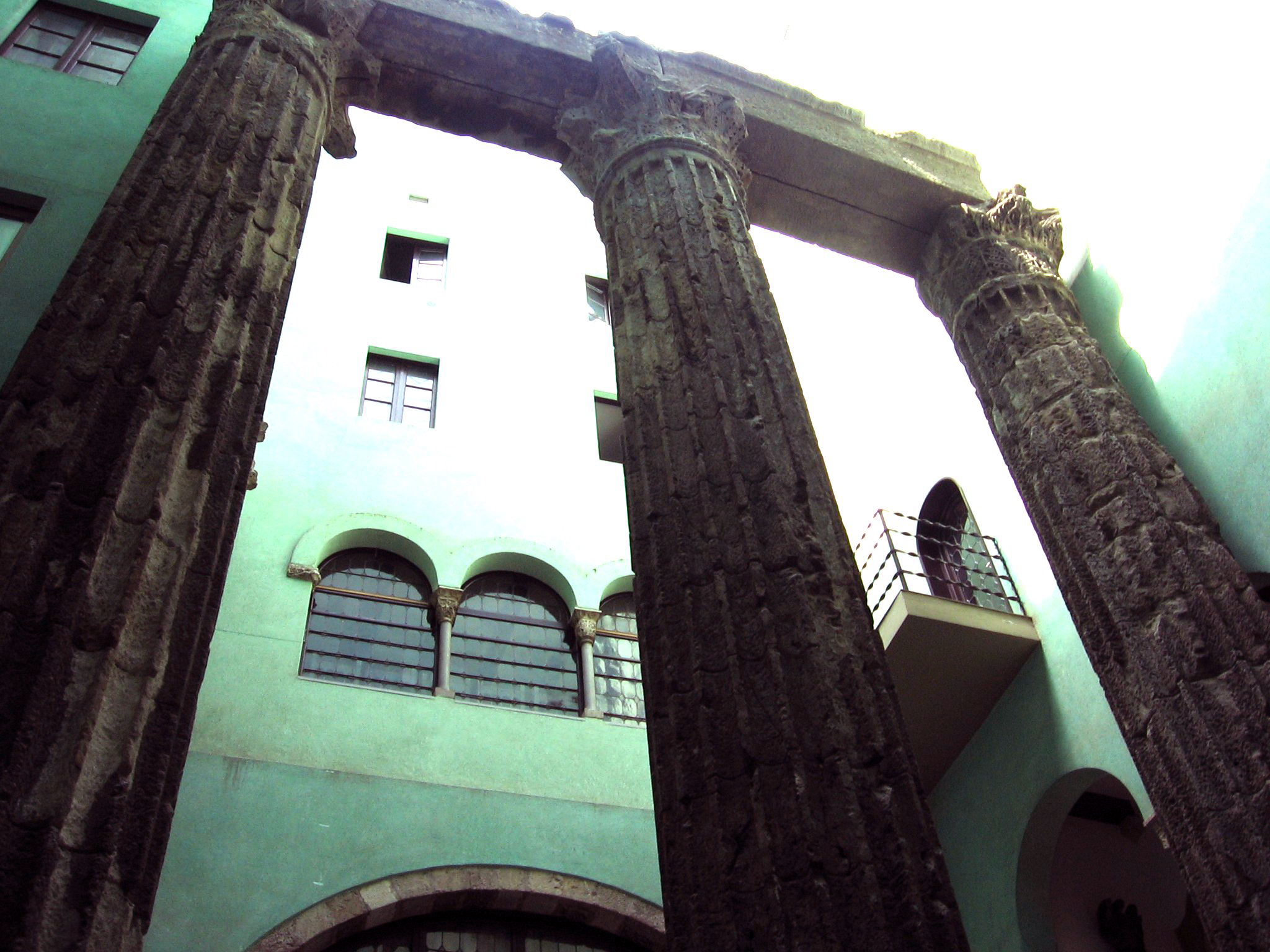 Columnas del Templo de Augusto, Barcelona.